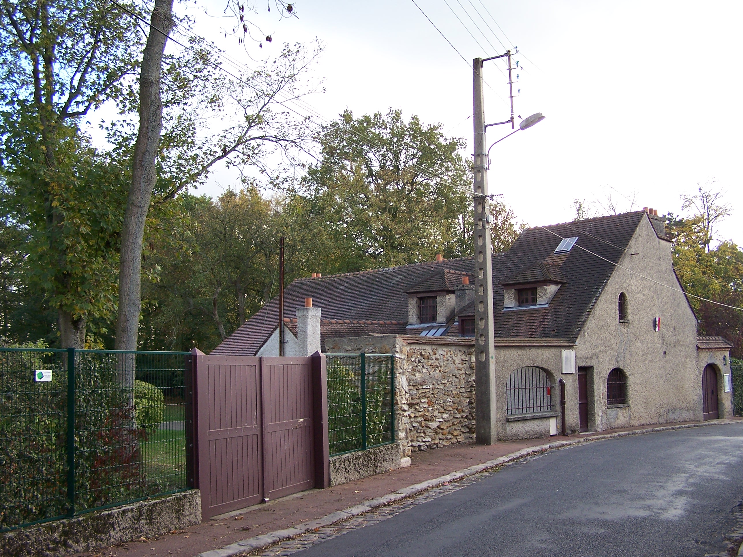 Mairie de Jouy-en-Josas (Yvelines, France)